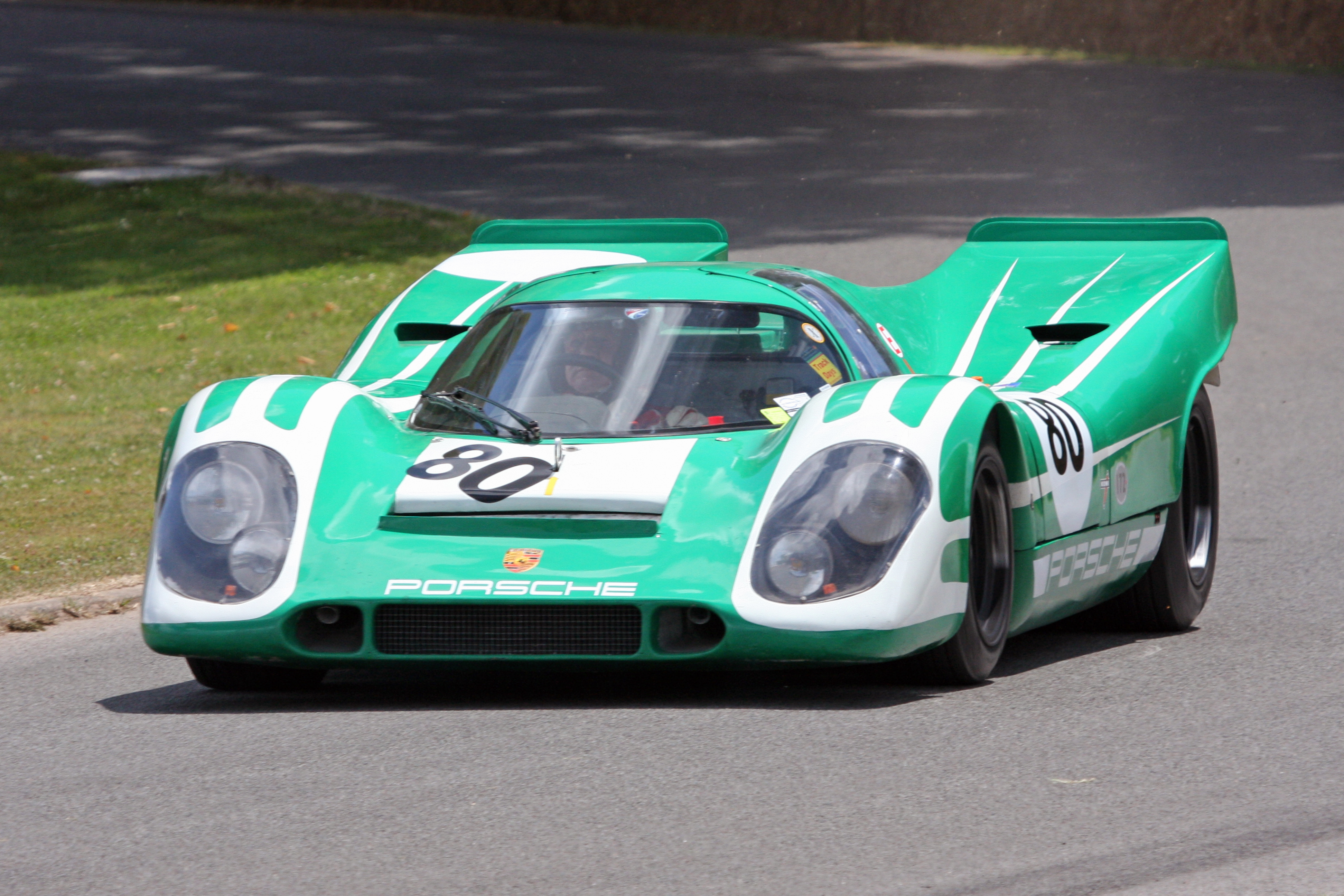 1969 Porsche 917K